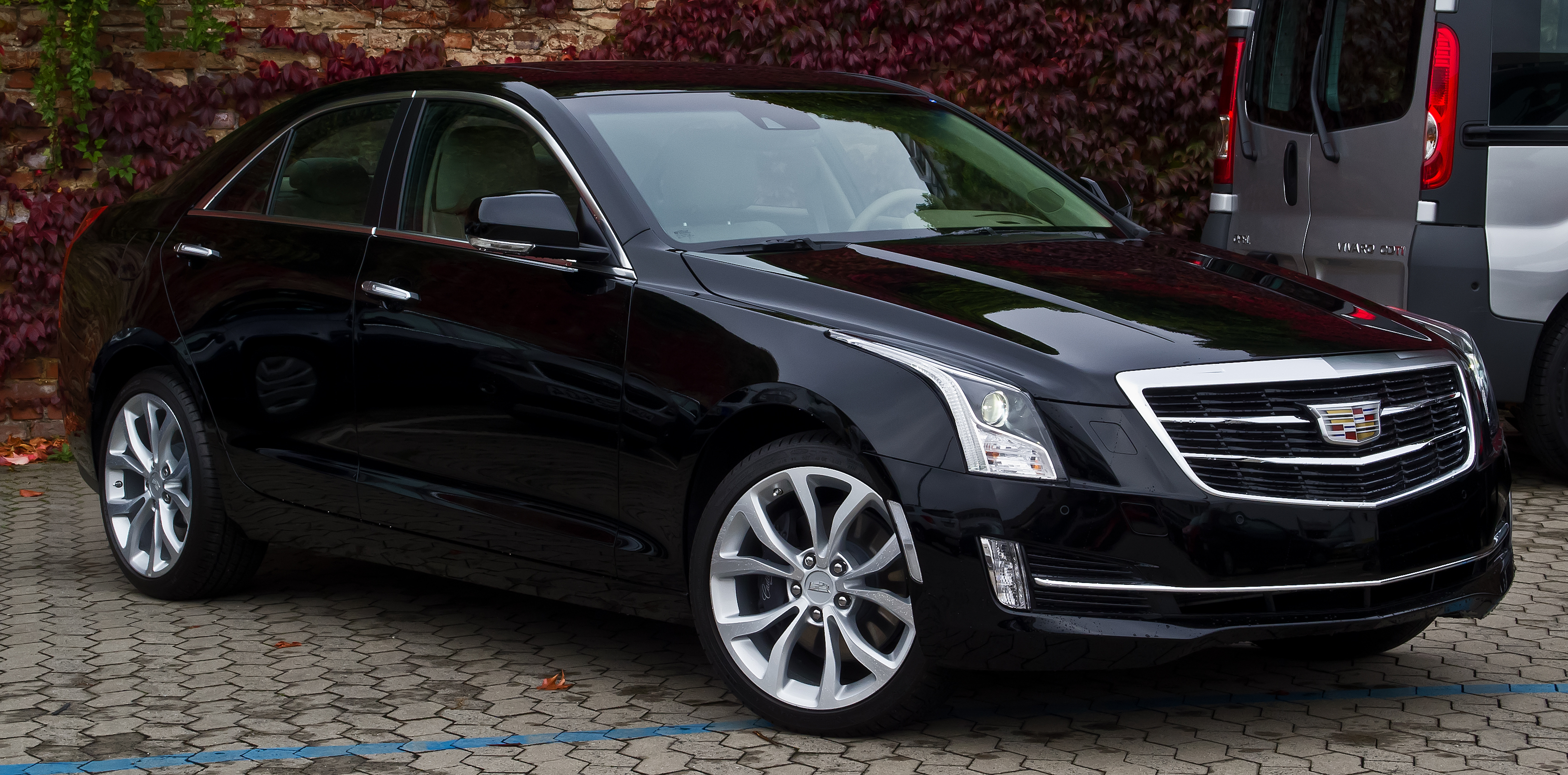 Cadillac ATS 2.0 Turbo AWD Premium